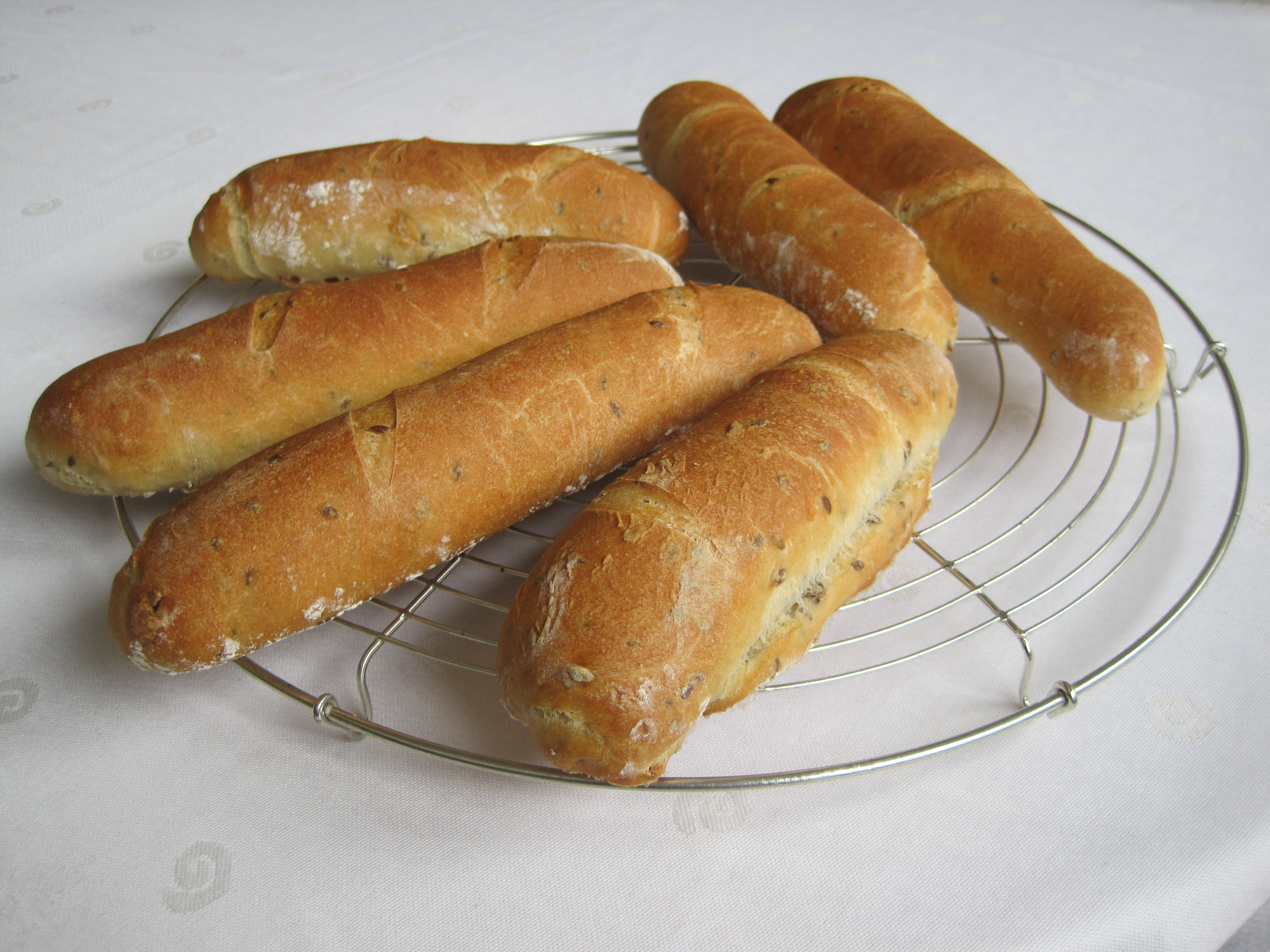 Brötchen aus Dinkelmehl mit Leinsamen